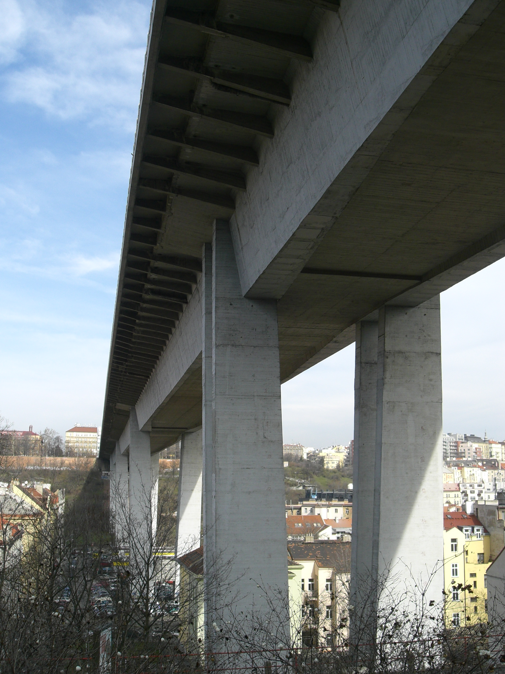 Nuselský most, Praha, Czechia